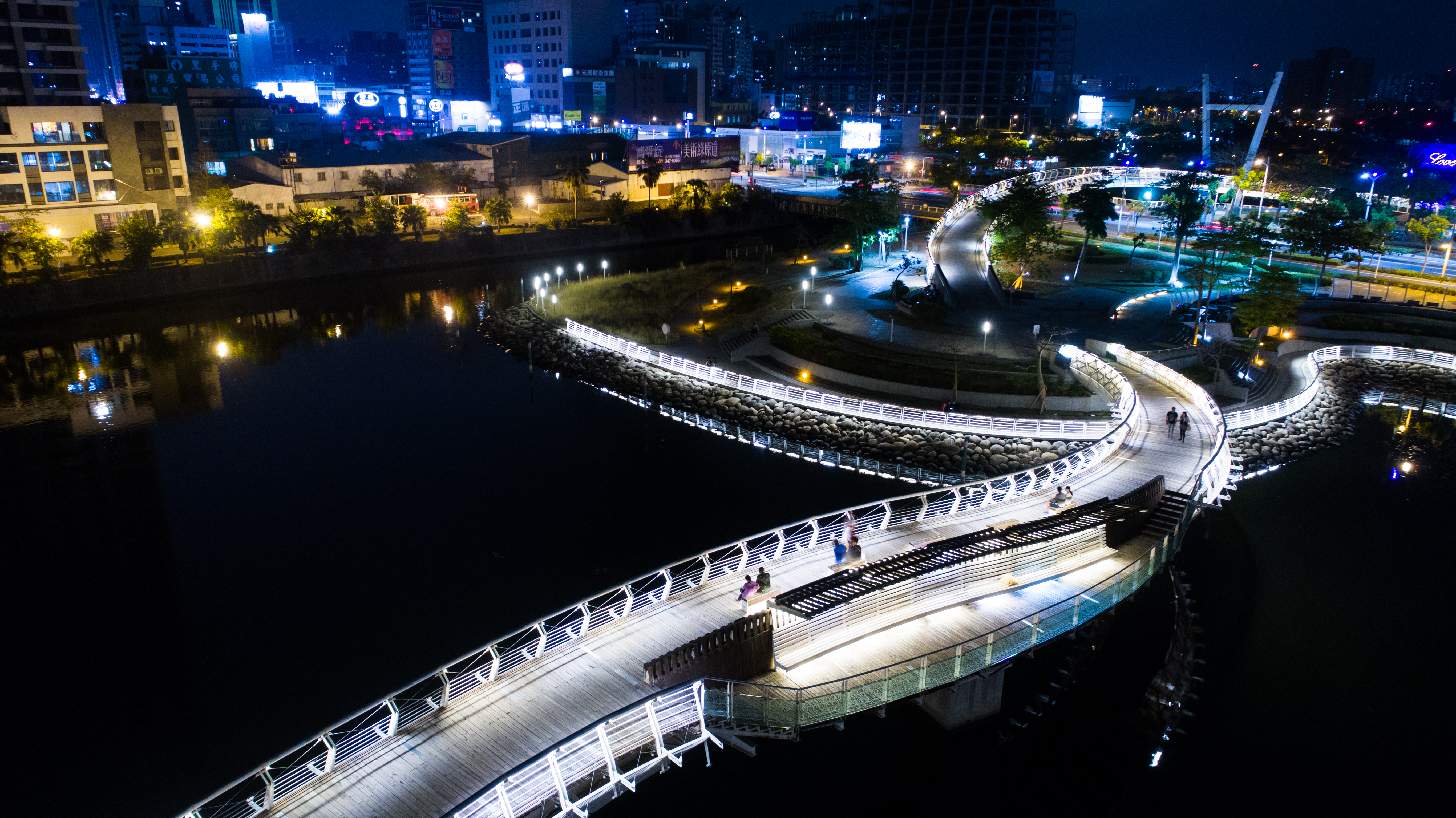 中文（台灣）: 愛河之心橋特寫